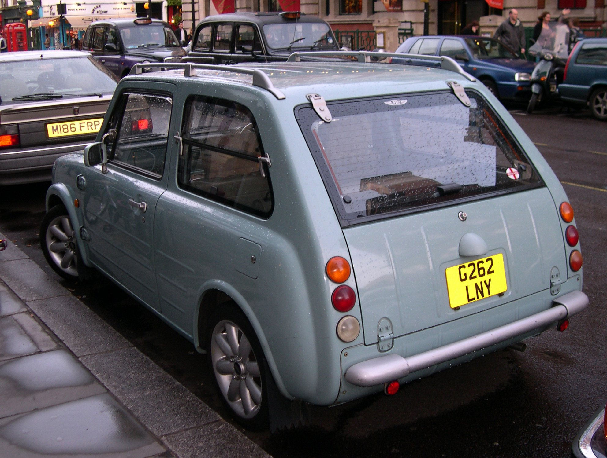 Nissan Pao